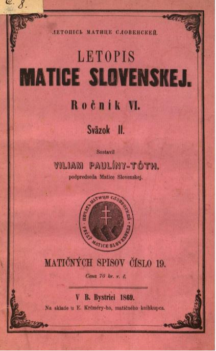 Titulný list časopisu Letopis Matice slovenskej, ktorý vyšiel v r. 1869 v Banskej Bystrici.